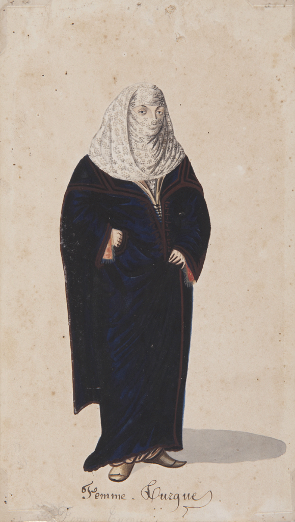 Femme turque, Anonyme français XIXème. Aquarelle sur papier collé sur papier. Hauteur de la feuille en mm 245 ; Largeur de la feuille en mm 140. Numéro d'inventaire : Bx M 1548. Historique : Ancienne collection BONIE. Mode d'acquisition Legs Bonie, 1895. (Musée des Beaux-Arts - Mairie de Bordeaux. Cliché DAVID, Florian).